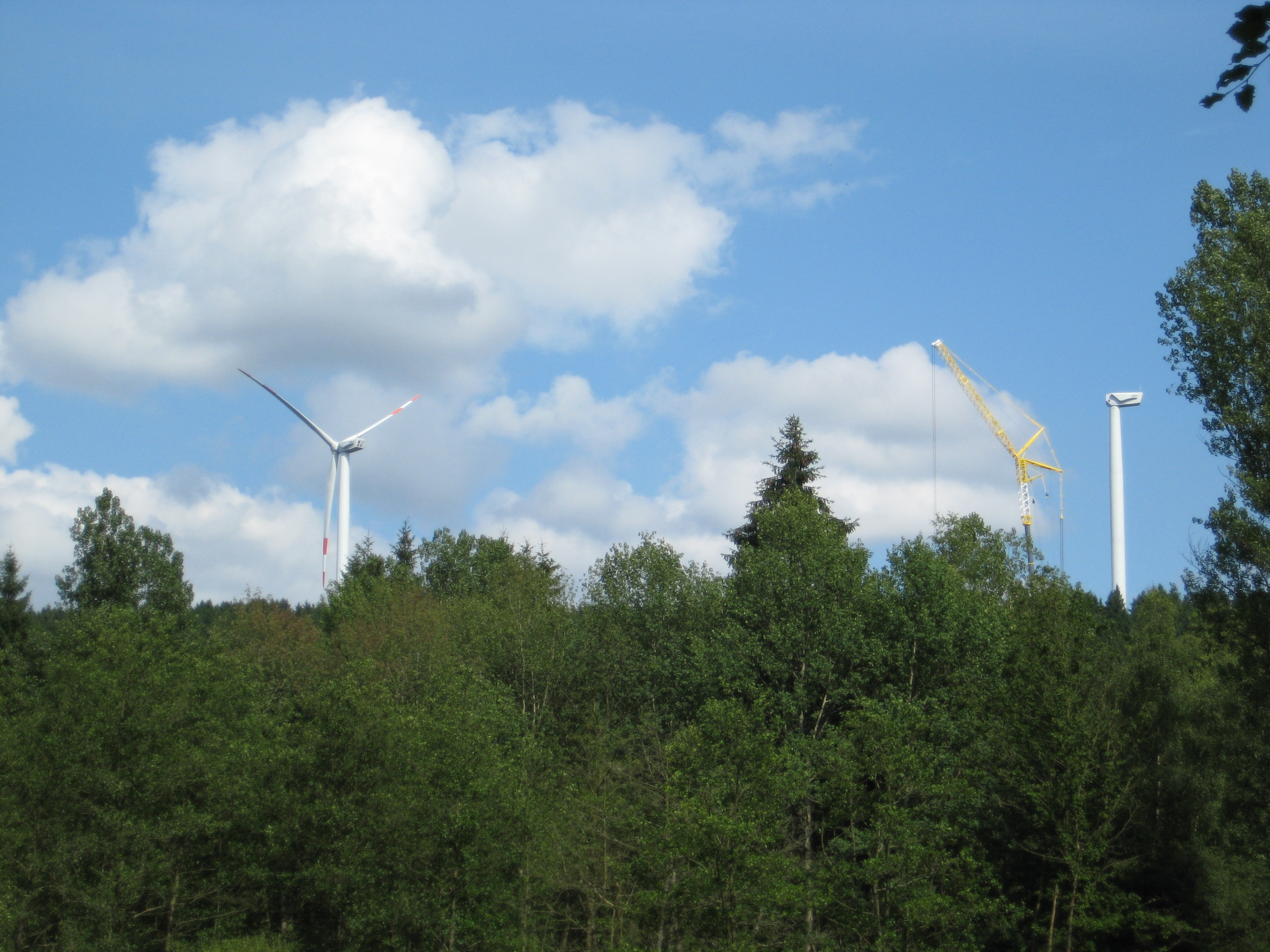 Montagearbeiten der Windräder auf Gilsbacher Gebiet am Hang der Kalteiche am 26. Juli 2009.